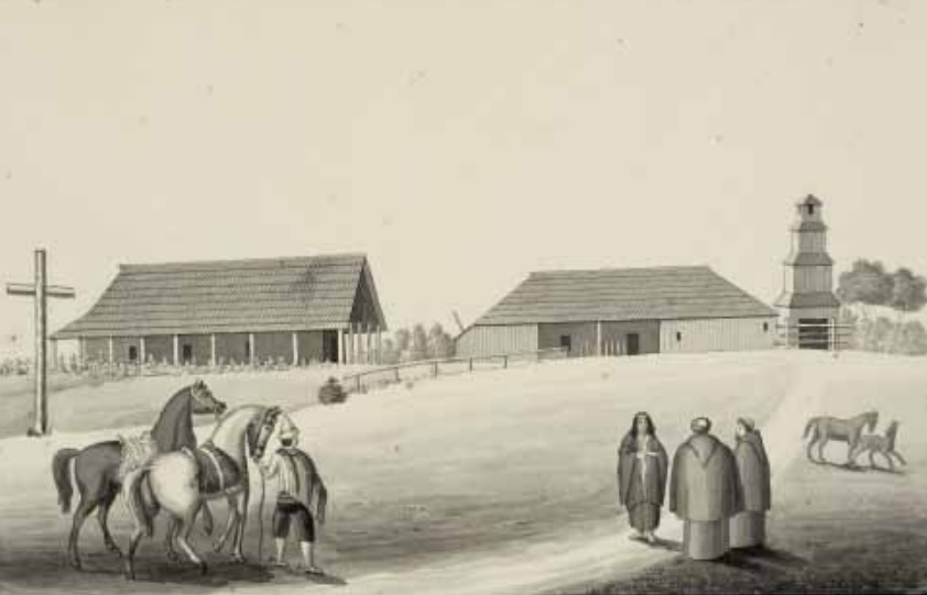 Mision de Daglipulli en el año 1852 cerca de Valdivia